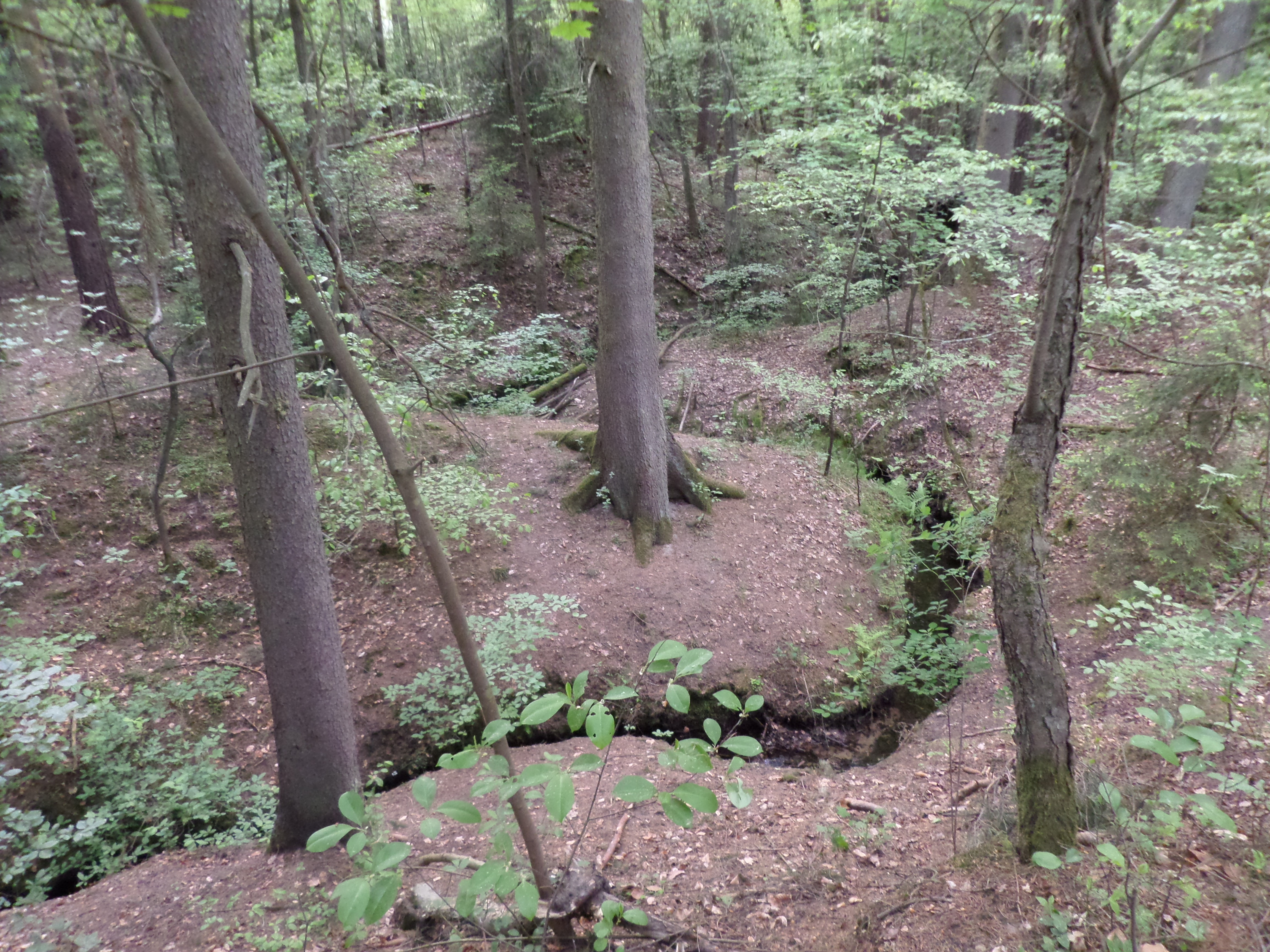 Tiefgraben (Erlenstegen)